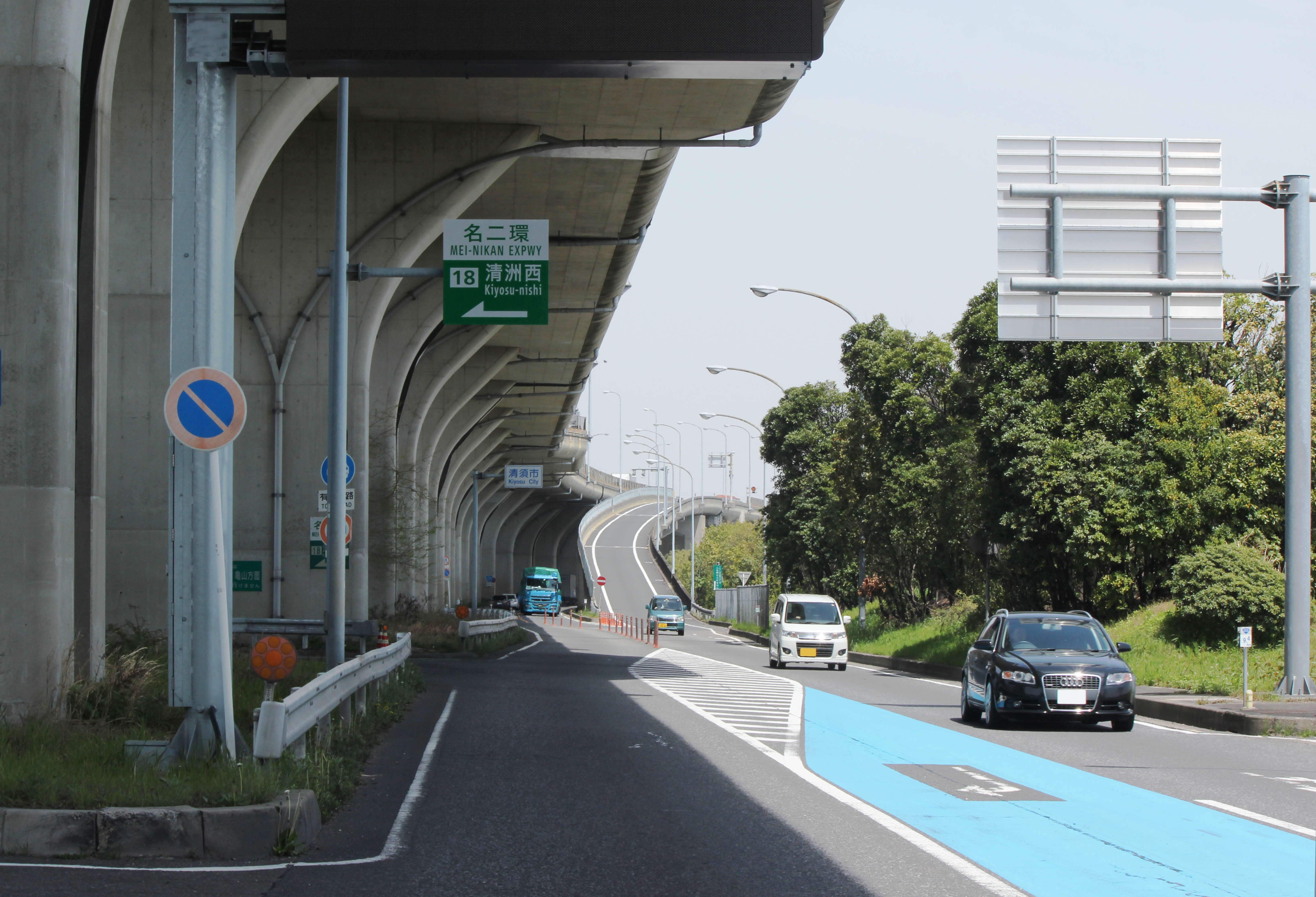 名二環（外回り、楠JCT方面）清洲西IC入口